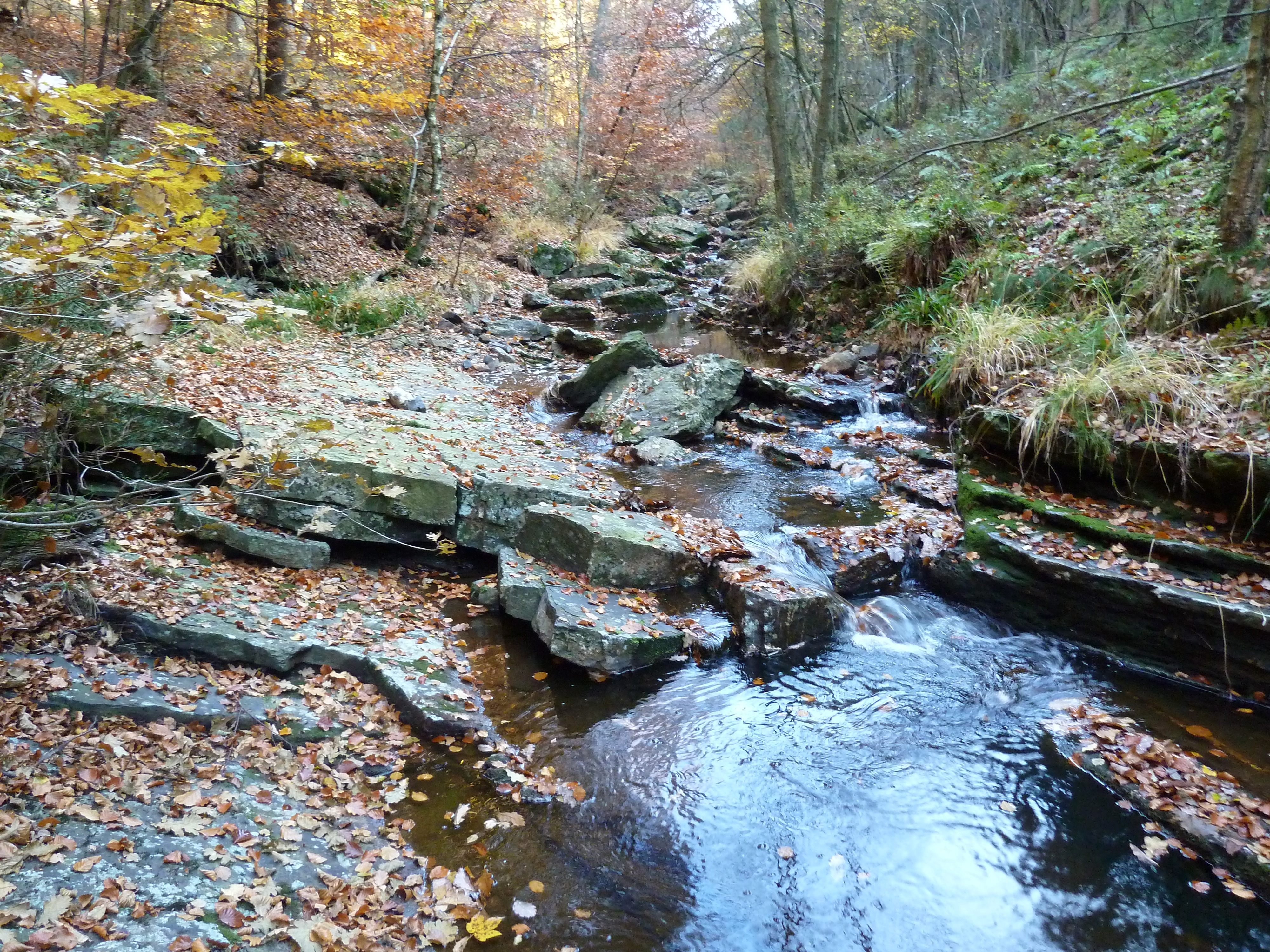 Statte, Solwaster, Belgique